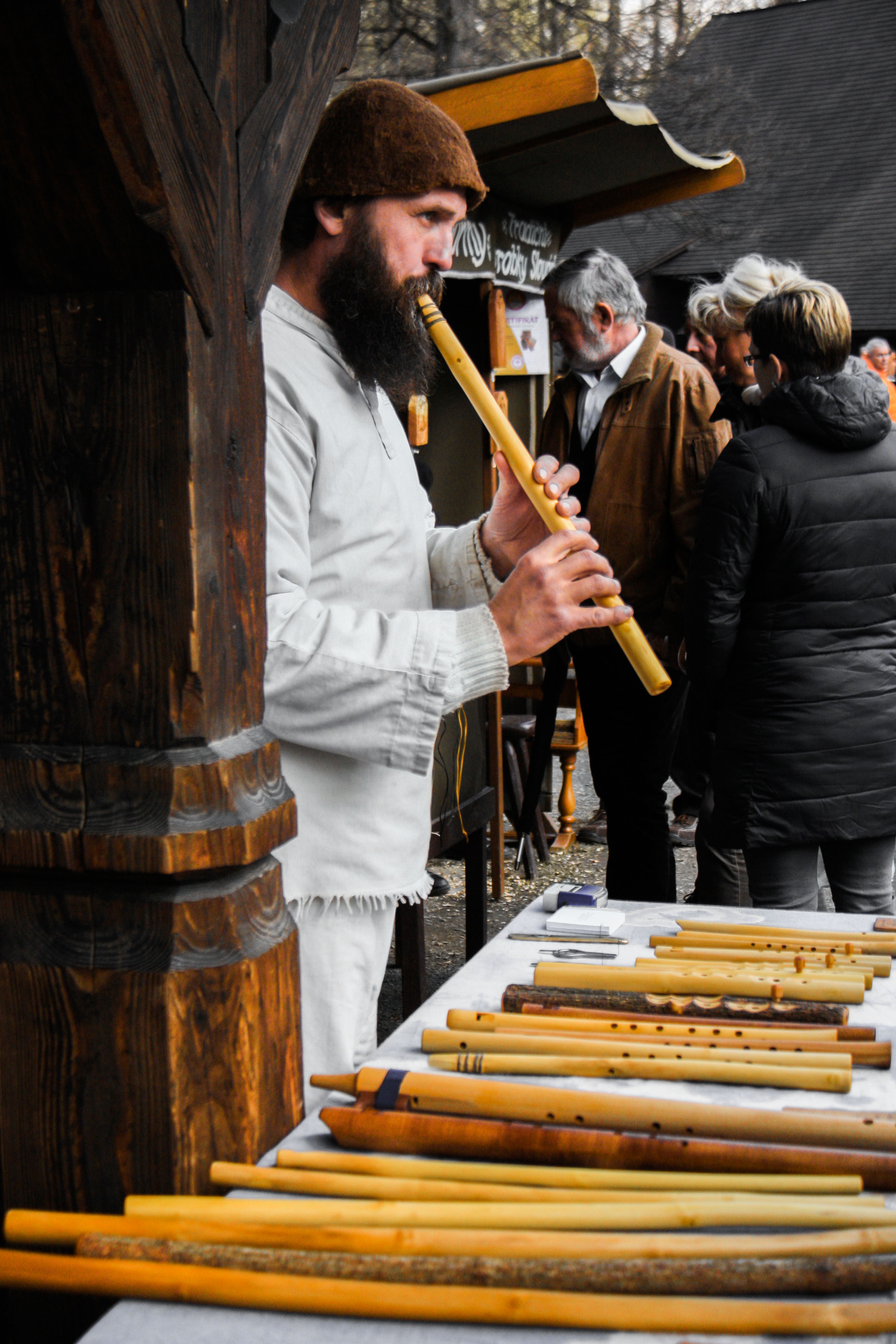 Zdjęcie przedstawia Víta Kašpaříka twórcę piszczałek karpackich (walaskich fujarek), sprzedającego swoje wyroby w 2017 roku podczas jarmarku wielkanocnego w Valašské muzeum v přírodě – skansen na Morawskiej Wołoszczyźnie znajdujący się w mieście Rožnov pod Radhoštěm.